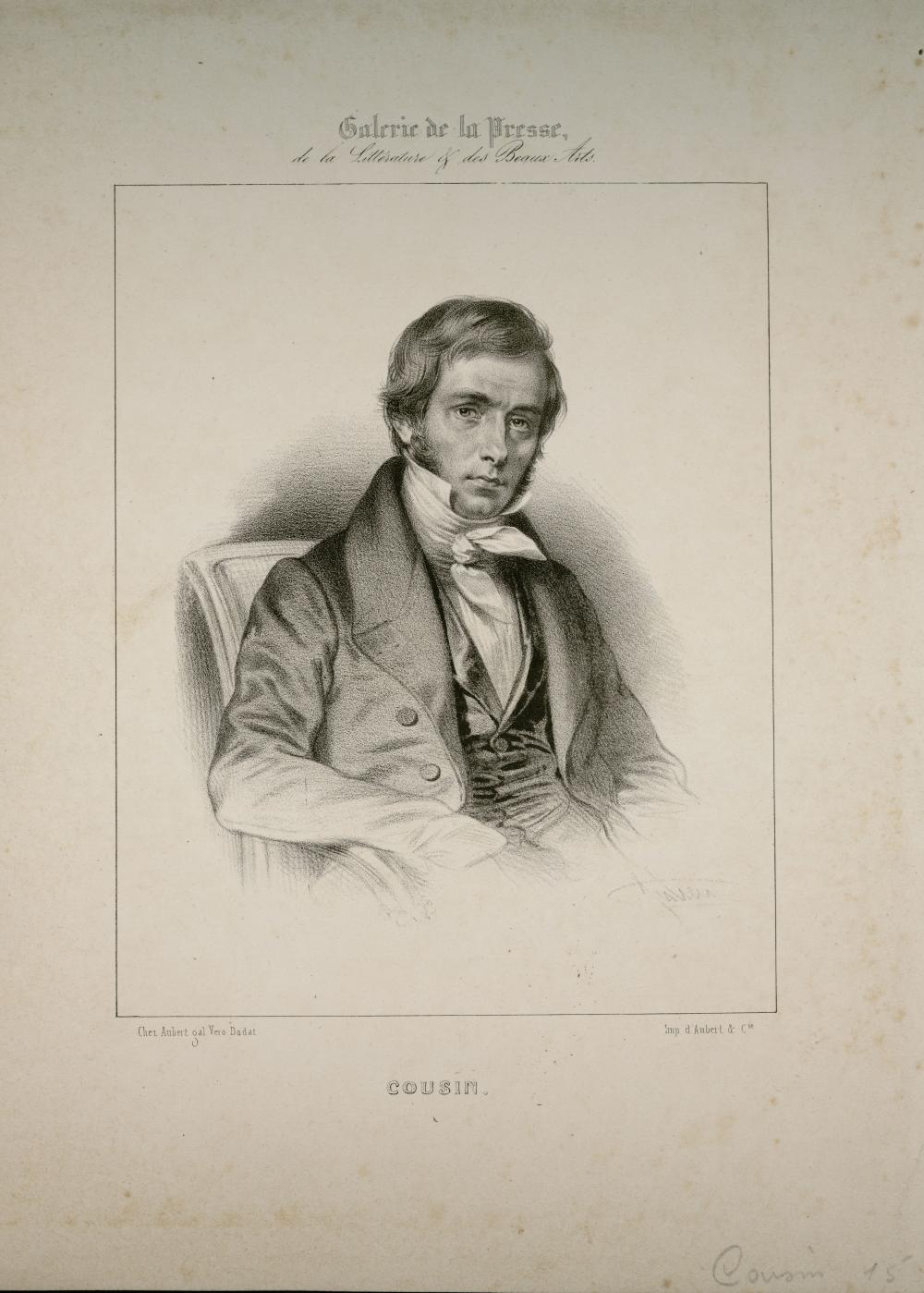 Estampe